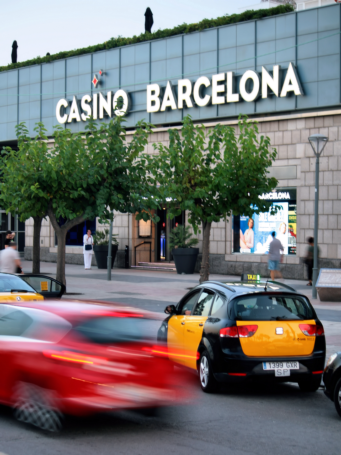 Barcelona (Spain)